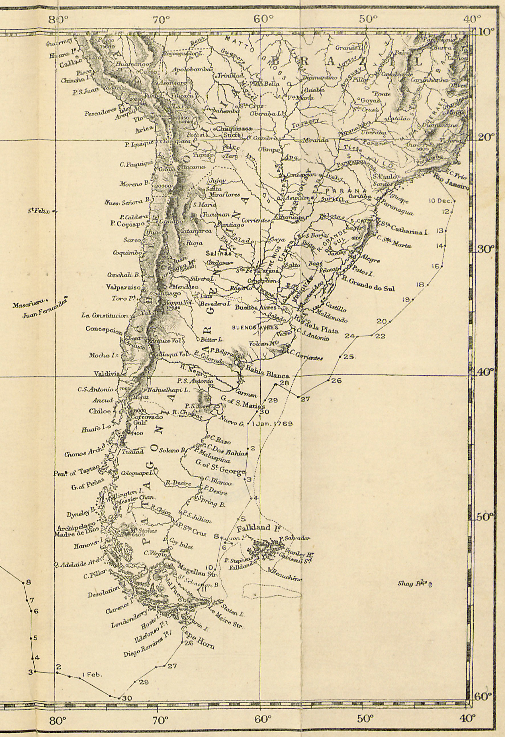 Fragmento del un grabado de I. Bayly para la edición de los diarios del primer viaje del teniente James Cook en el HMB Endeavour editada por William J.Ll. Wharton y publicada por Elliot Stock en 1893, Londres. Muestra la ruta realizada por el HMB Endeavour desde su salida de Río de Janeiro, Brasil, el 10 de diciembre de 1769 en el océano Atlántico sur hasta rebasar el cabo de Hornos y llegar al pacífico sur en febrero de 1769.